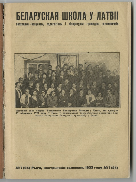 Беларуская школа ў Латвіі № 7 (24)